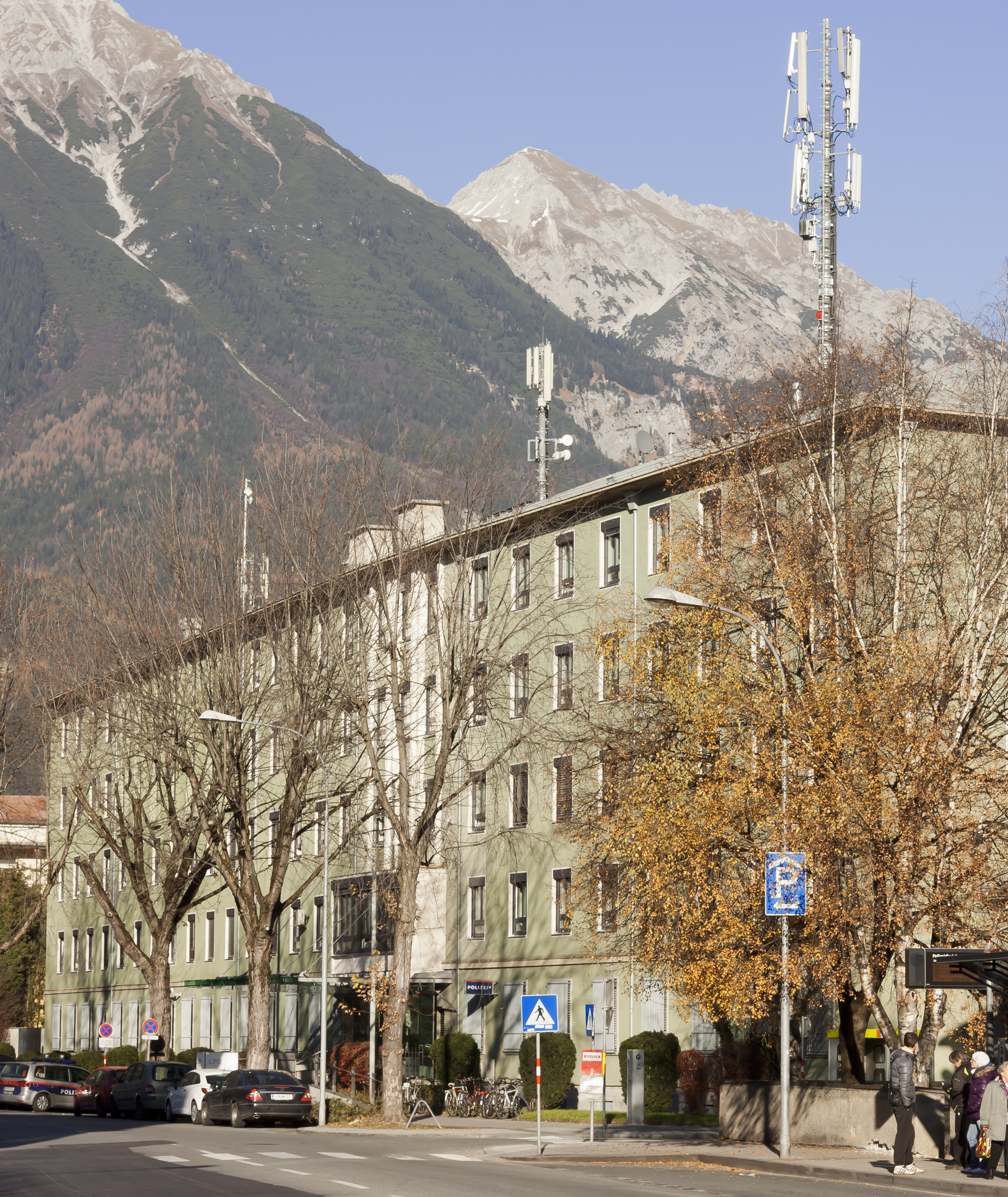 Gebäude der ehemaligen Bundespolizeidirektion Innsbruck in der Kaiserjägerstraße 8. Heute Sitz des Stadtpolizeikommandos Innsbruck, des Polizeianhaltezentrums und weiterer Dienststellen der Bundespolizei.